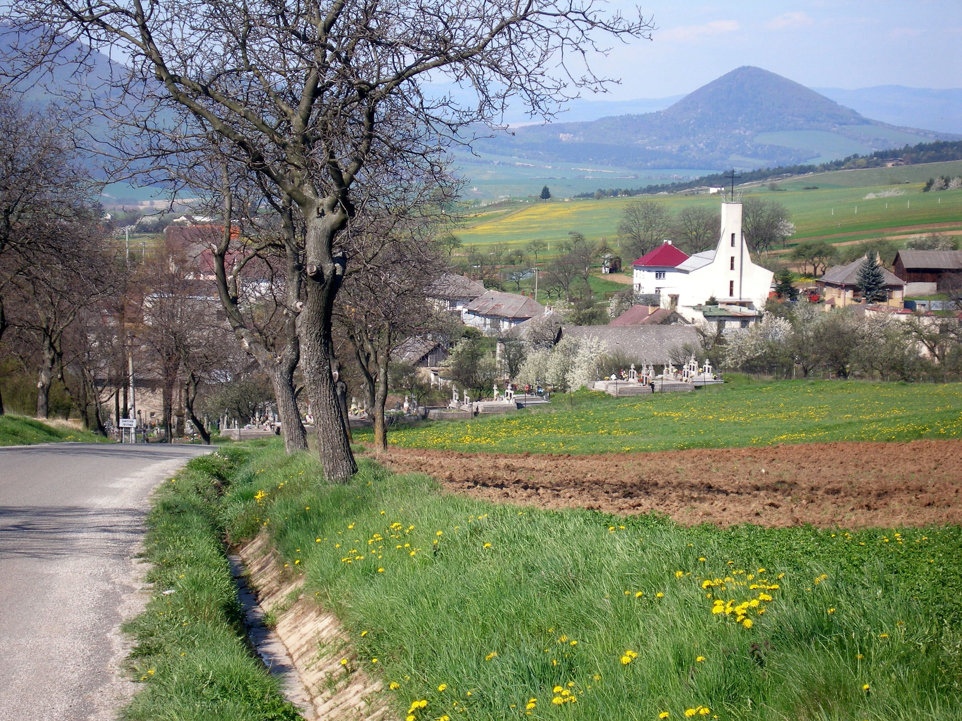 Obec Šarišská Trstená okres Prešov región Šariš